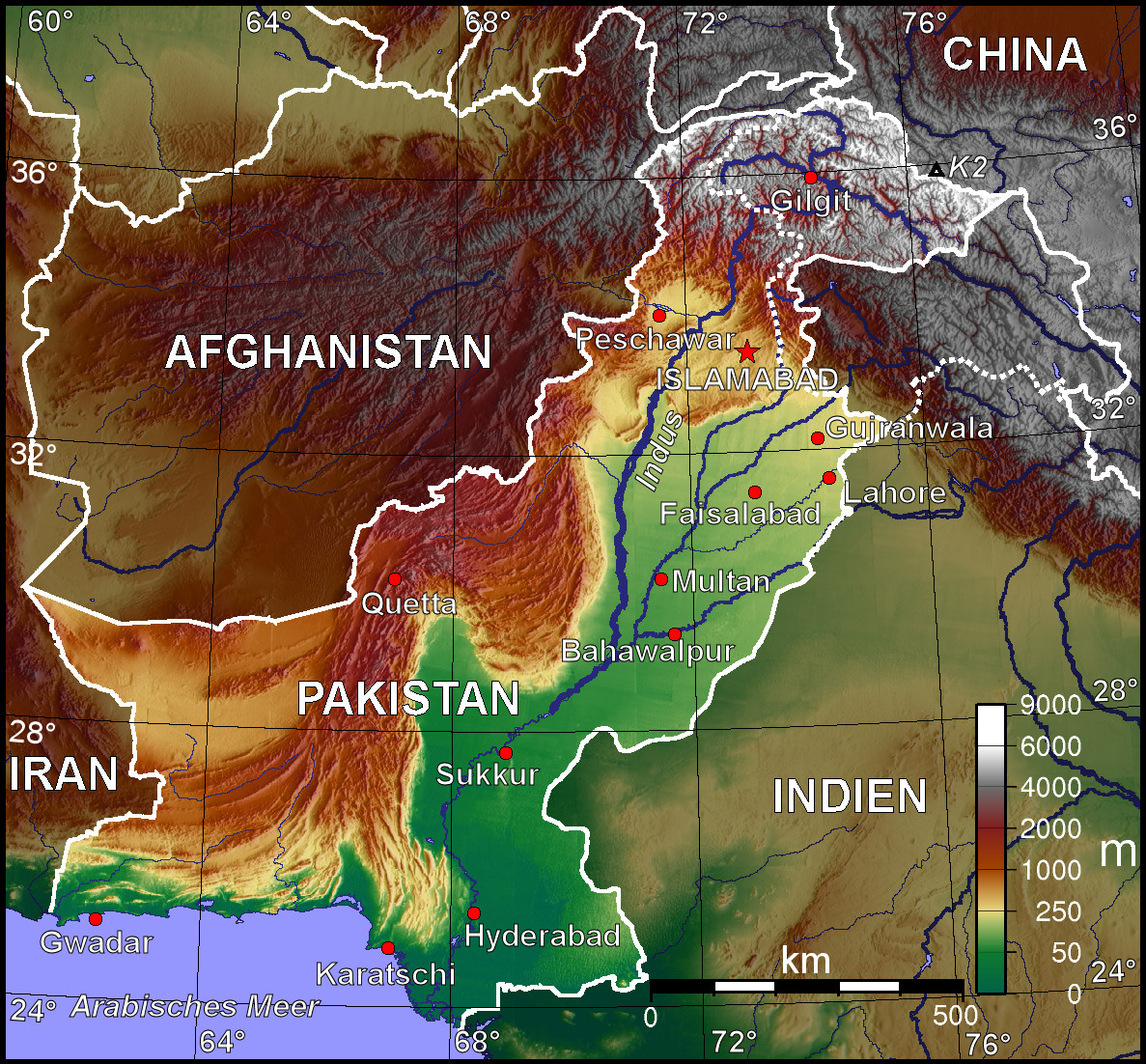 Topografische Karte Pakistans (deutschsprachige Version)